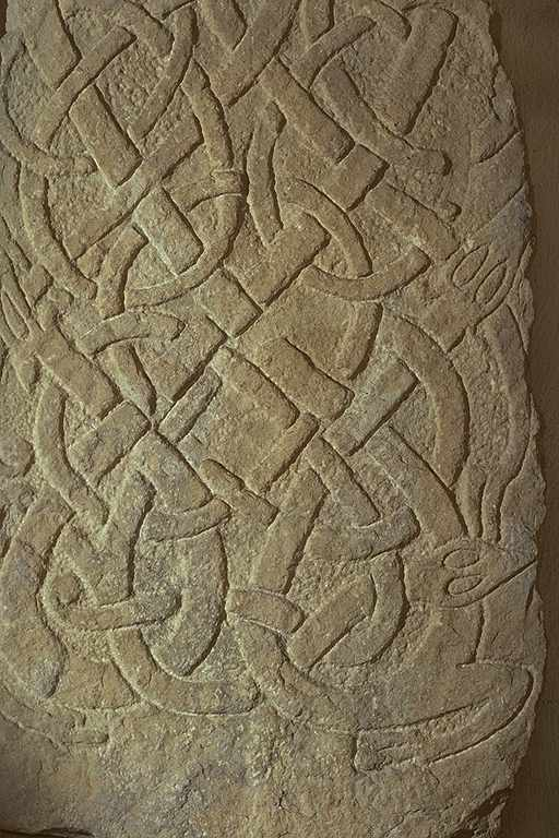 Inskriften, som finns på stenens vänstra smalsida lyder: Tavest lät resa stenen efter .., sin broder. Gud hjälpe hans själ. Motiv: U722 Löts kyrka Nyckelord: Runor Kategori: Runristning/runsten Inskriften, som finns på stenens vänstra smalsida lyder: Tavest lät resa stenen efter .., sin broder. Gud hjälpe hans själ.